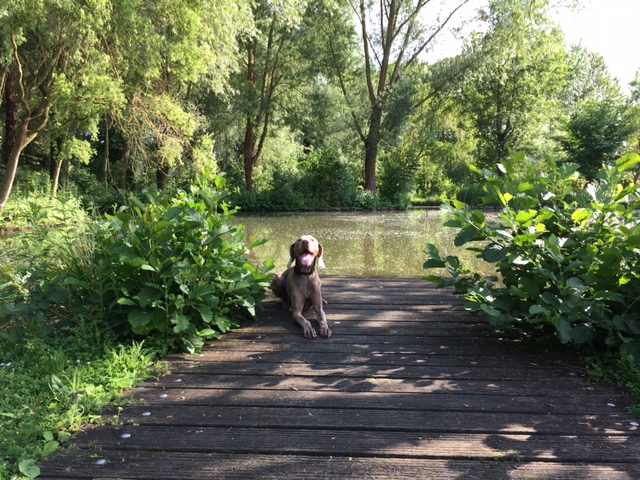 Le parc Saint Pierre à Amiens au pintemps